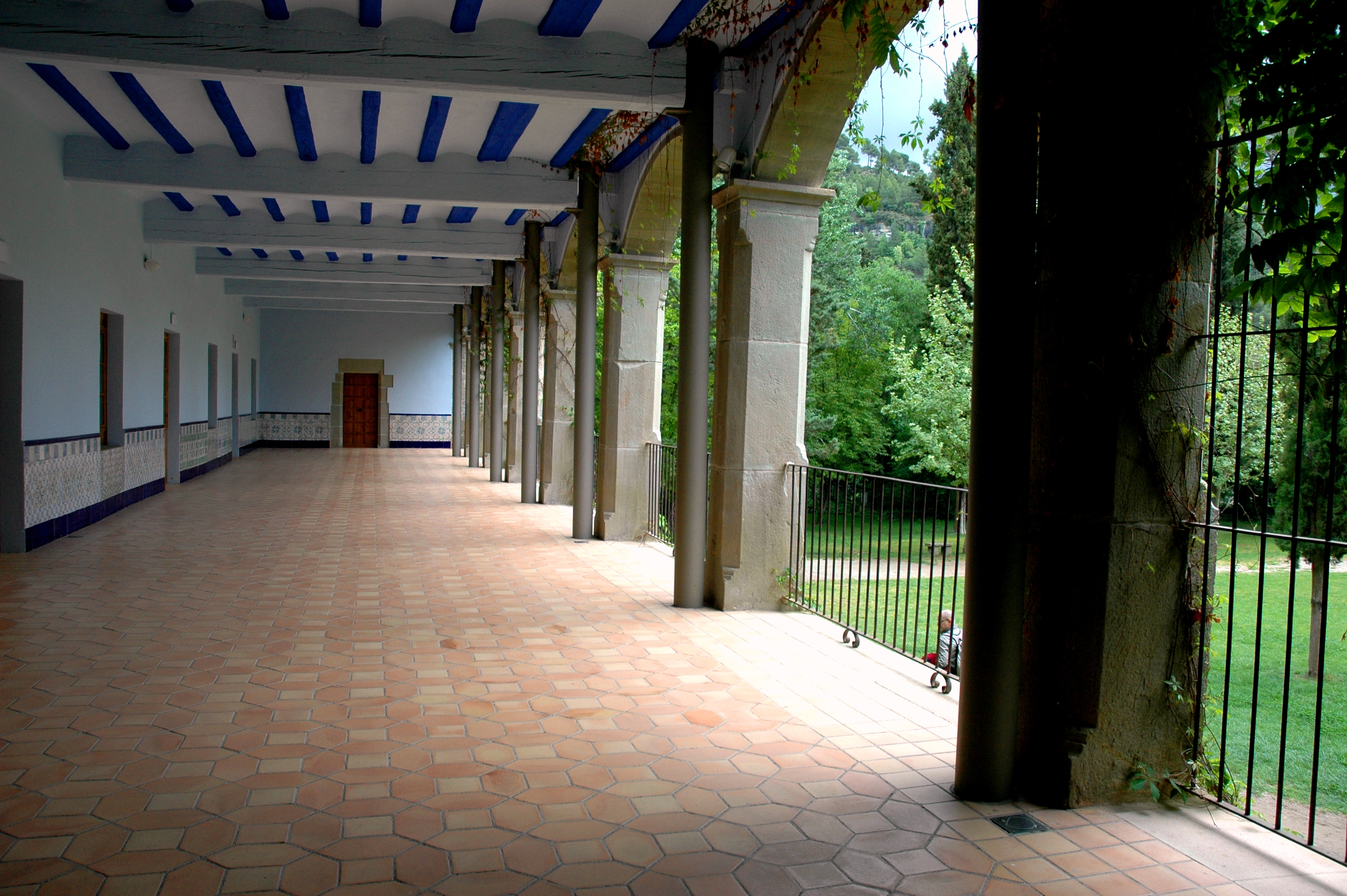 Sant Benet de Bages - Terrassa del migdia